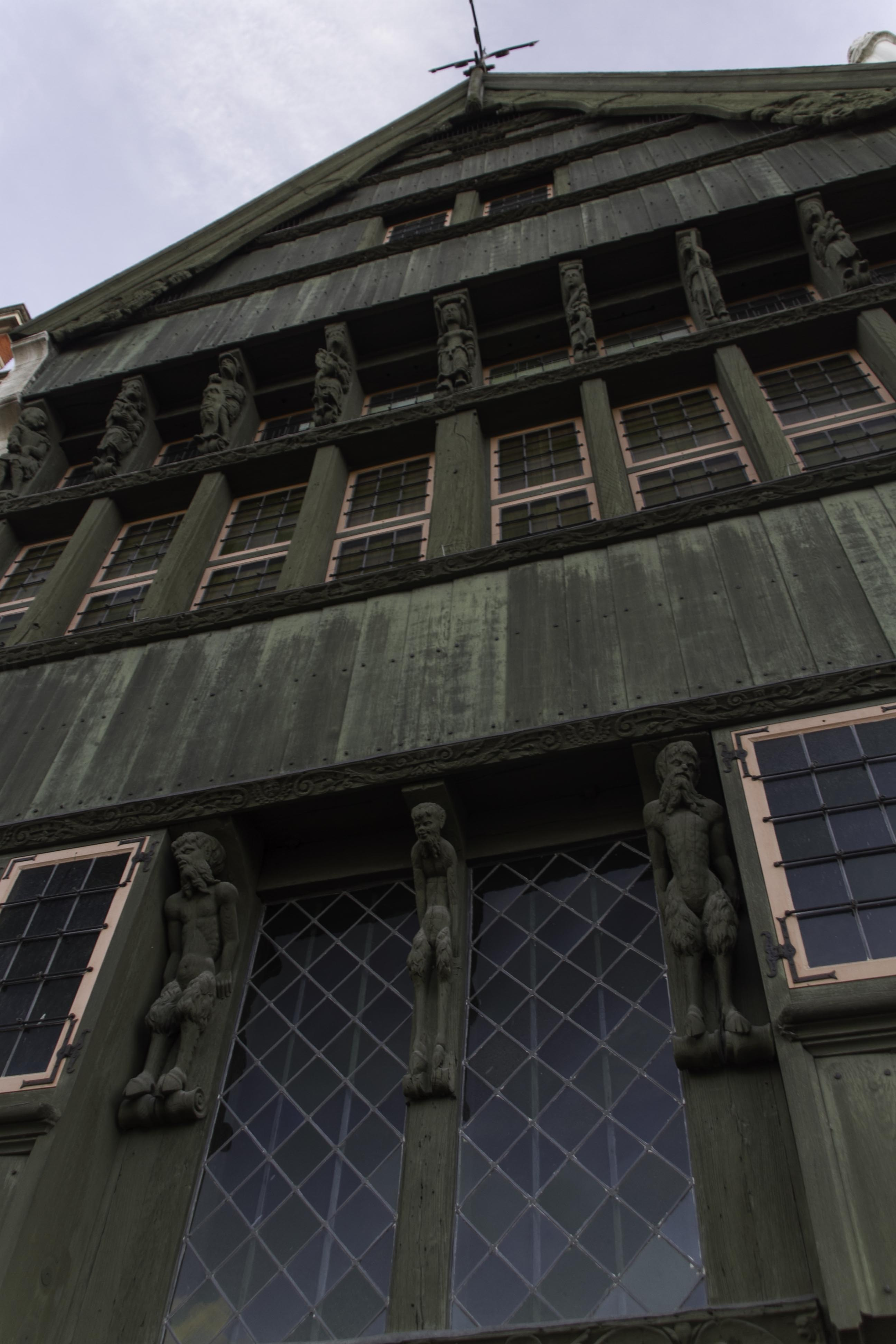 wooden house Mechelen